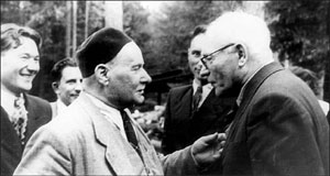 Якуб Колас (слева) и Янка Мавр (справа) на отдыхе. Дом творчества писателей. Королищевичи, 1950 год.